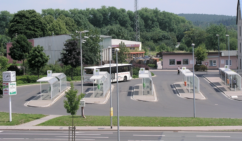 Das Bild zeigt den Busbahnhof in Ilmenau.